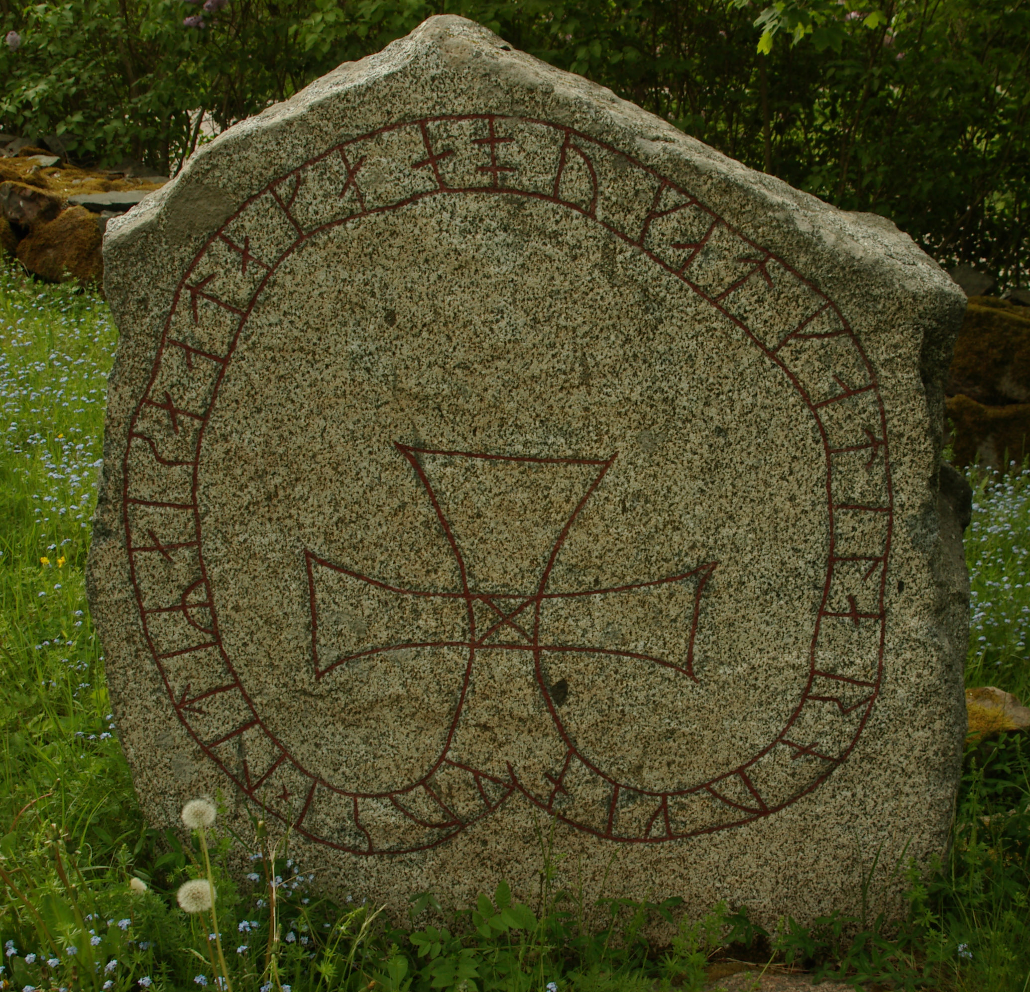 Upplands runinskrifter U946